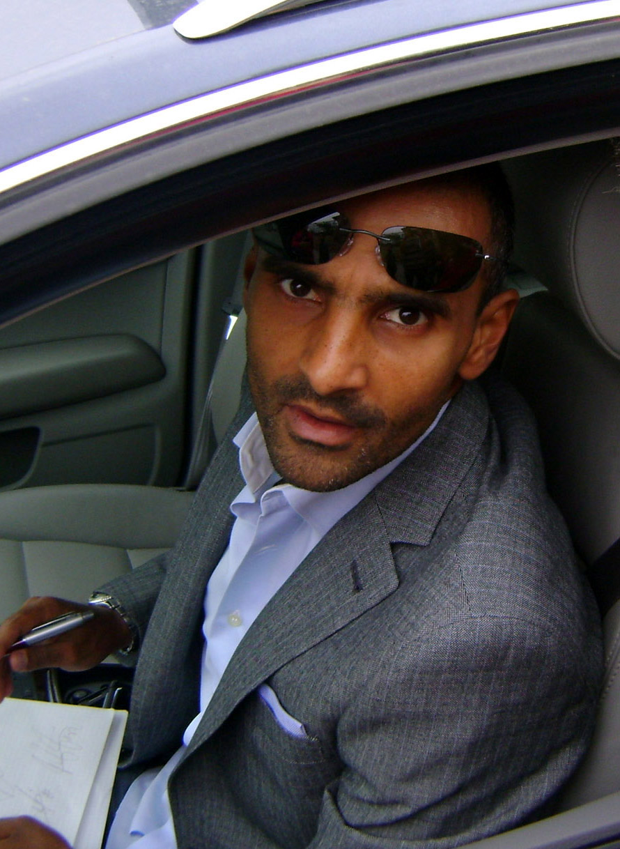 Il calciatore Fabio Liverani